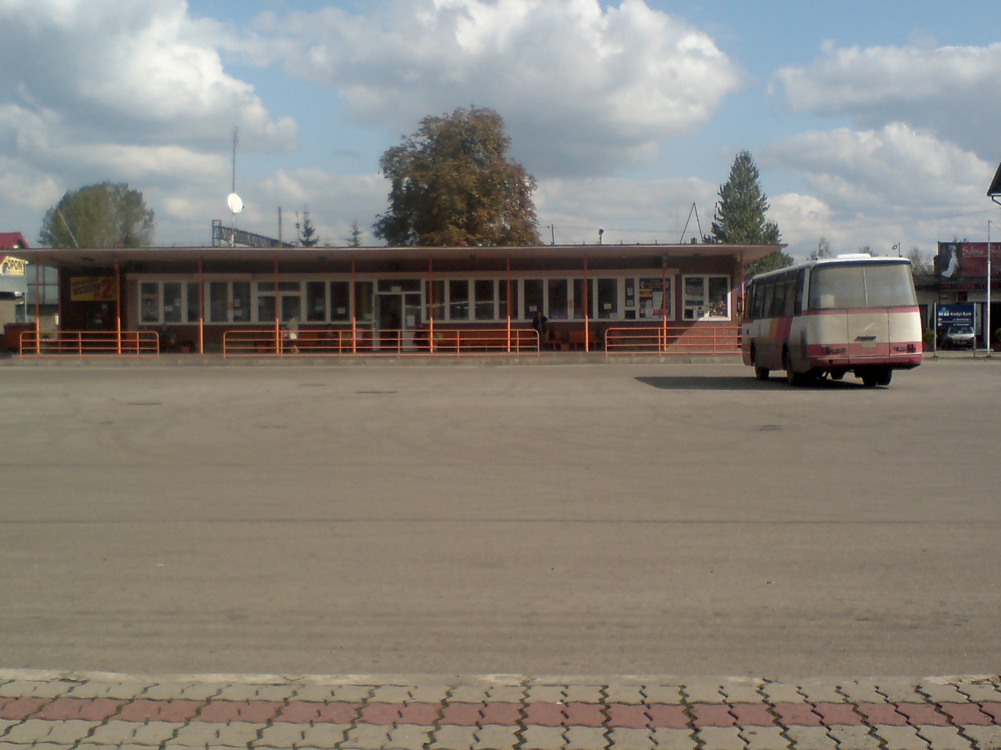 Leżajsk - Dworzec autobusowy (2008)